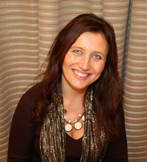 Jana Bousková-9048